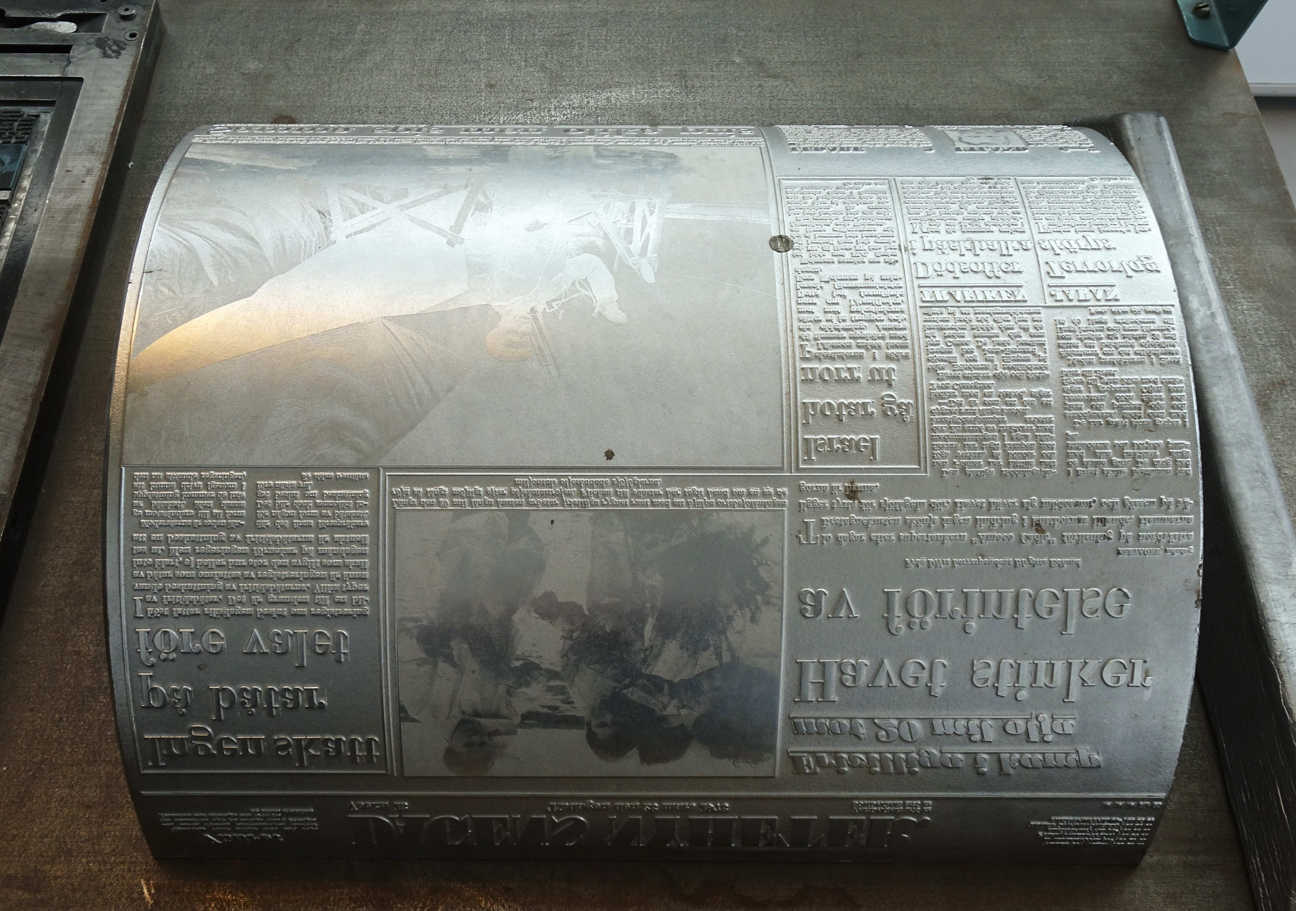 Den 10 april 1978 trycktes DN:s sista första-sidan i bly